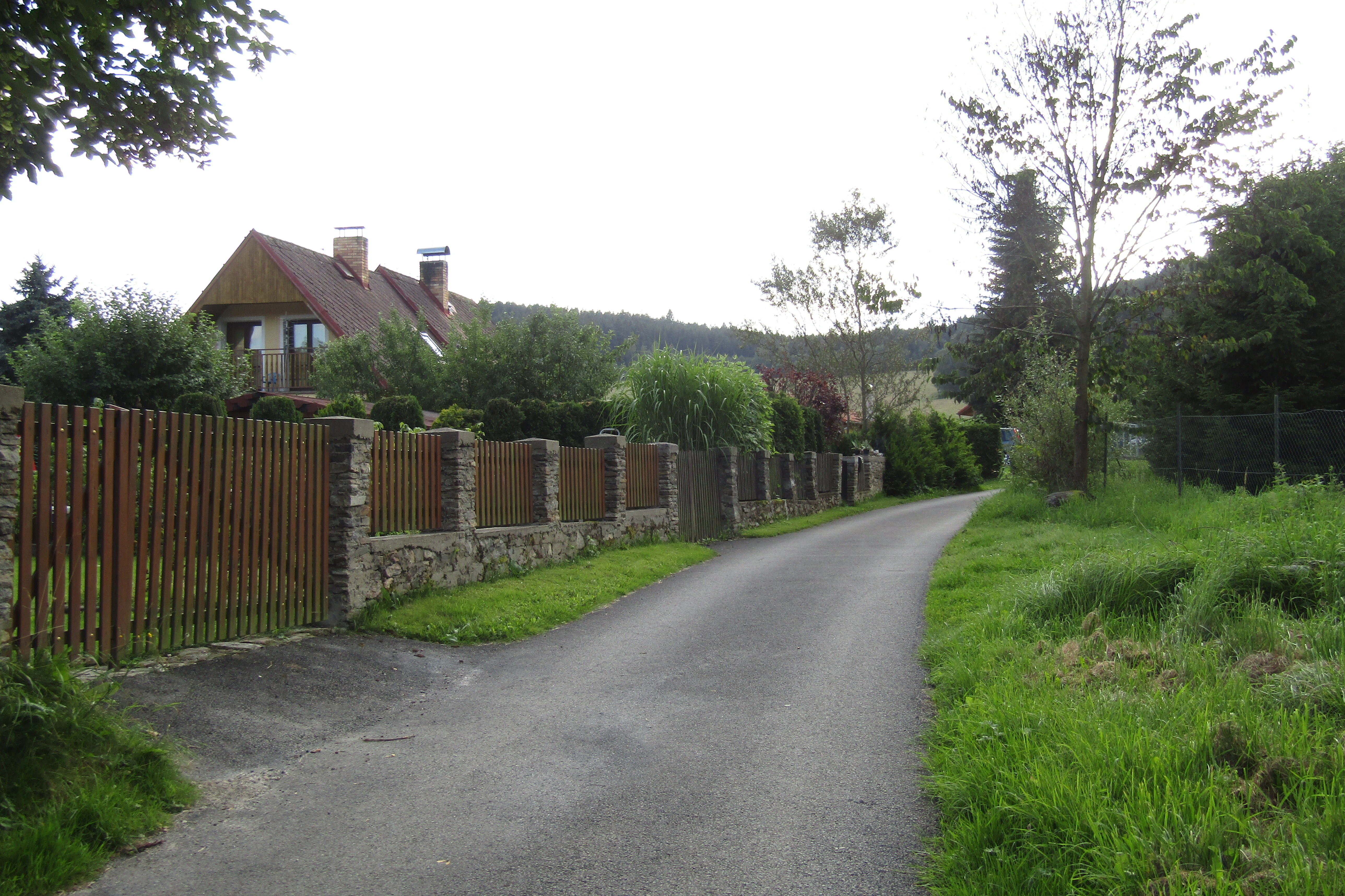 Ulice v Kladenské rovné v okrese Český Krumlov